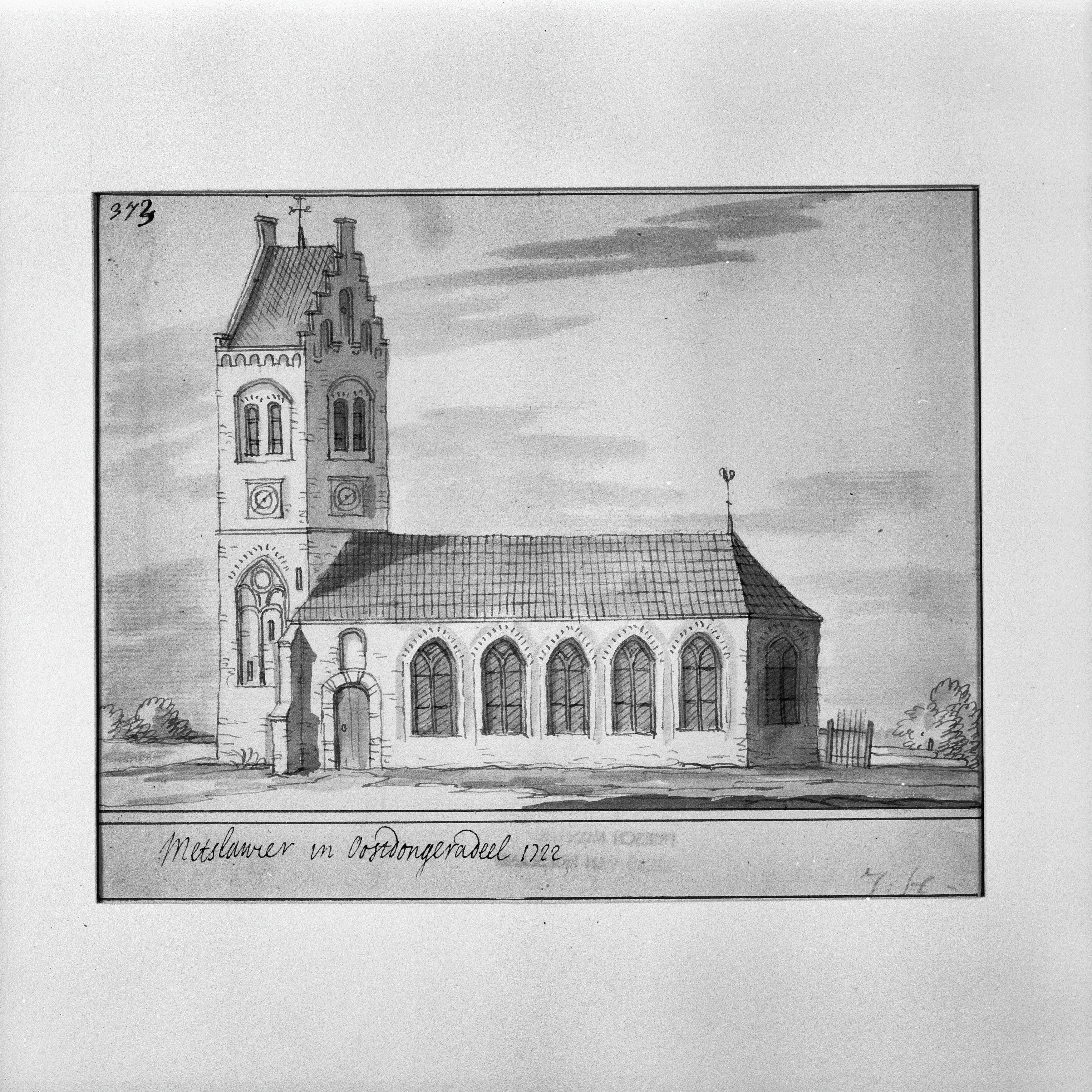 Nederlands Hervormde Kerk: kerk in 1722, tekening Stellingwerf Collectie Fries Museum